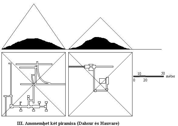 III Amenemhet két piramisa